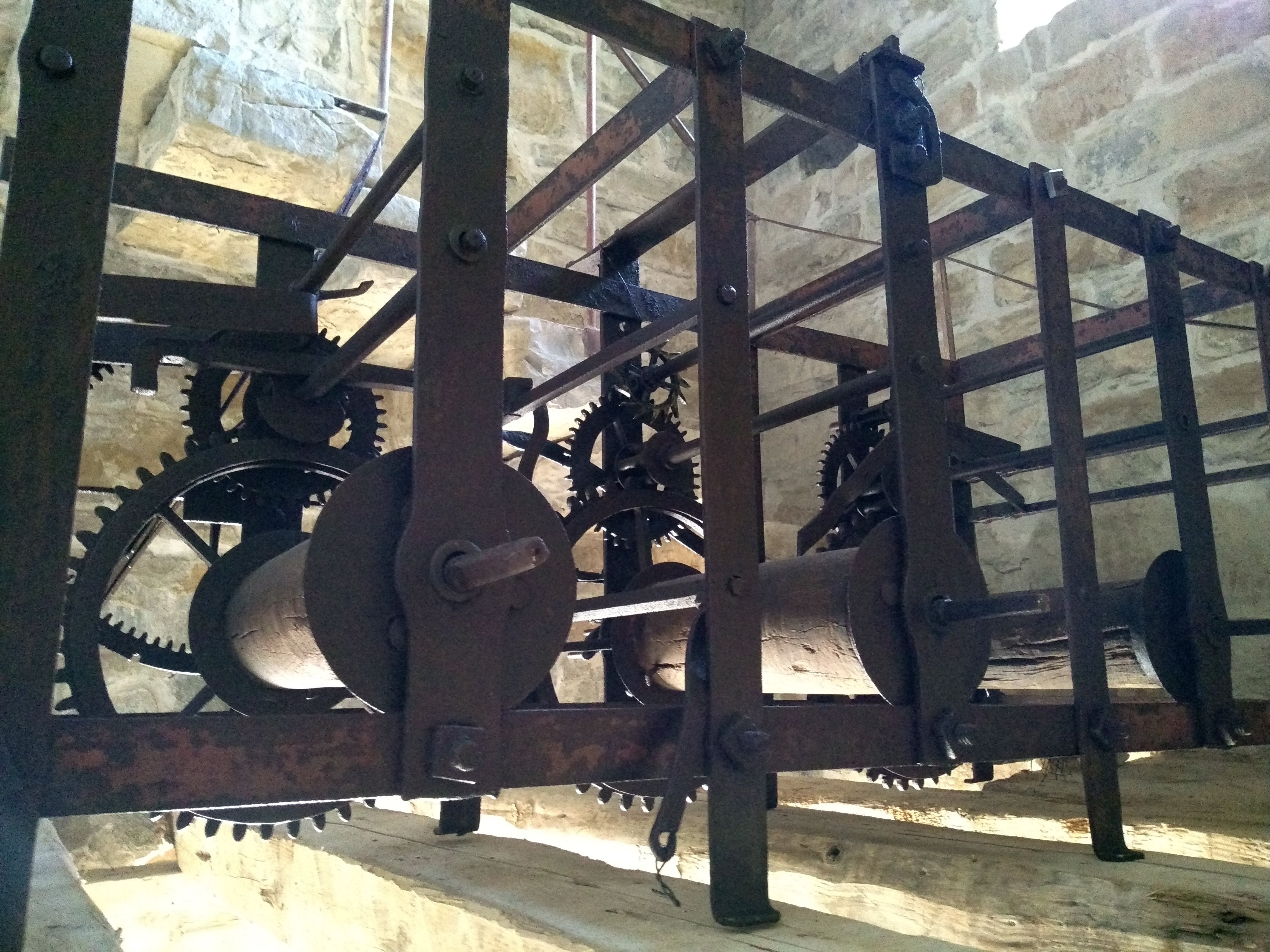 Leta 2019 je bil mehanizem ure restavriran.